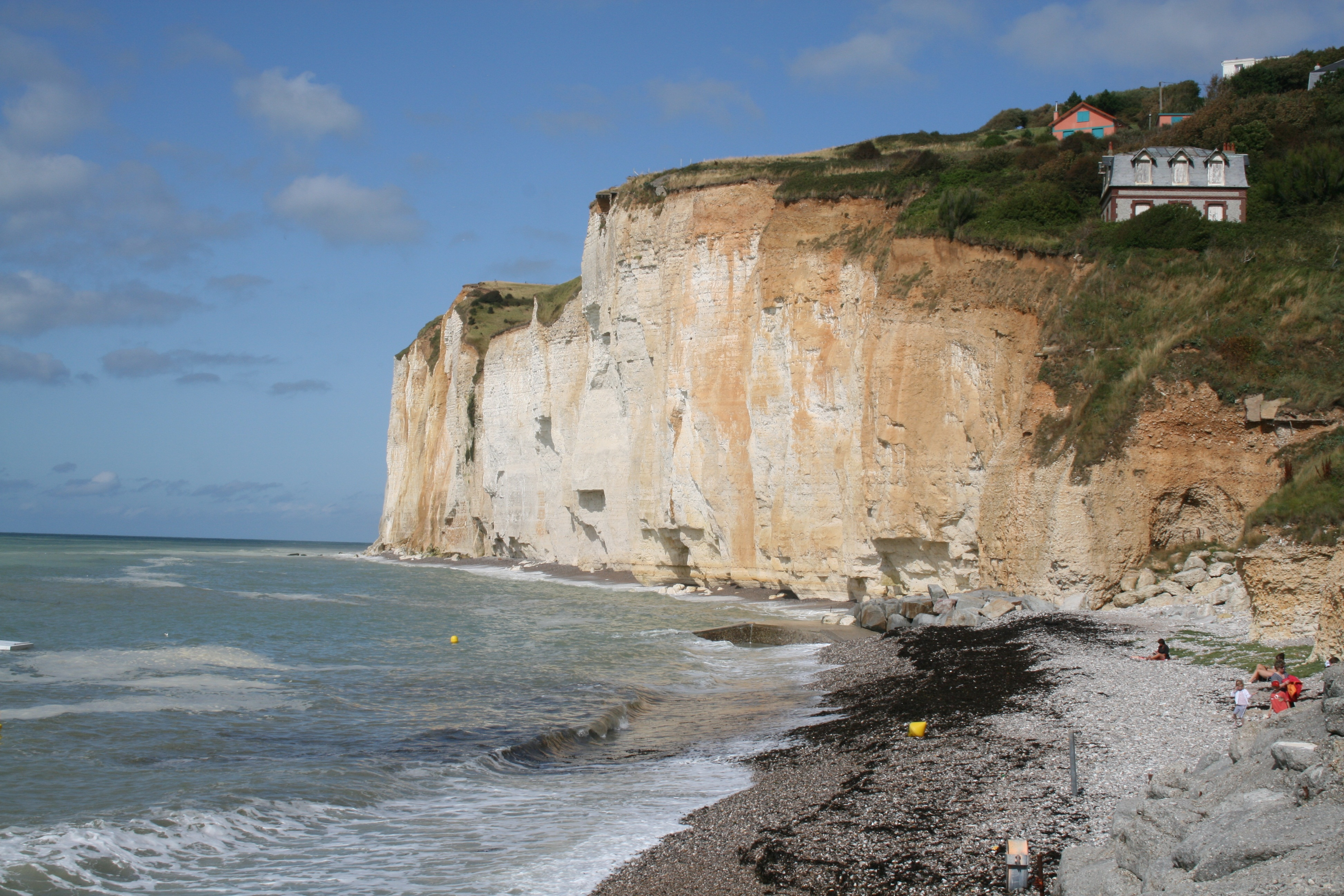 Saint Pierre-en Port Strand anno 2010